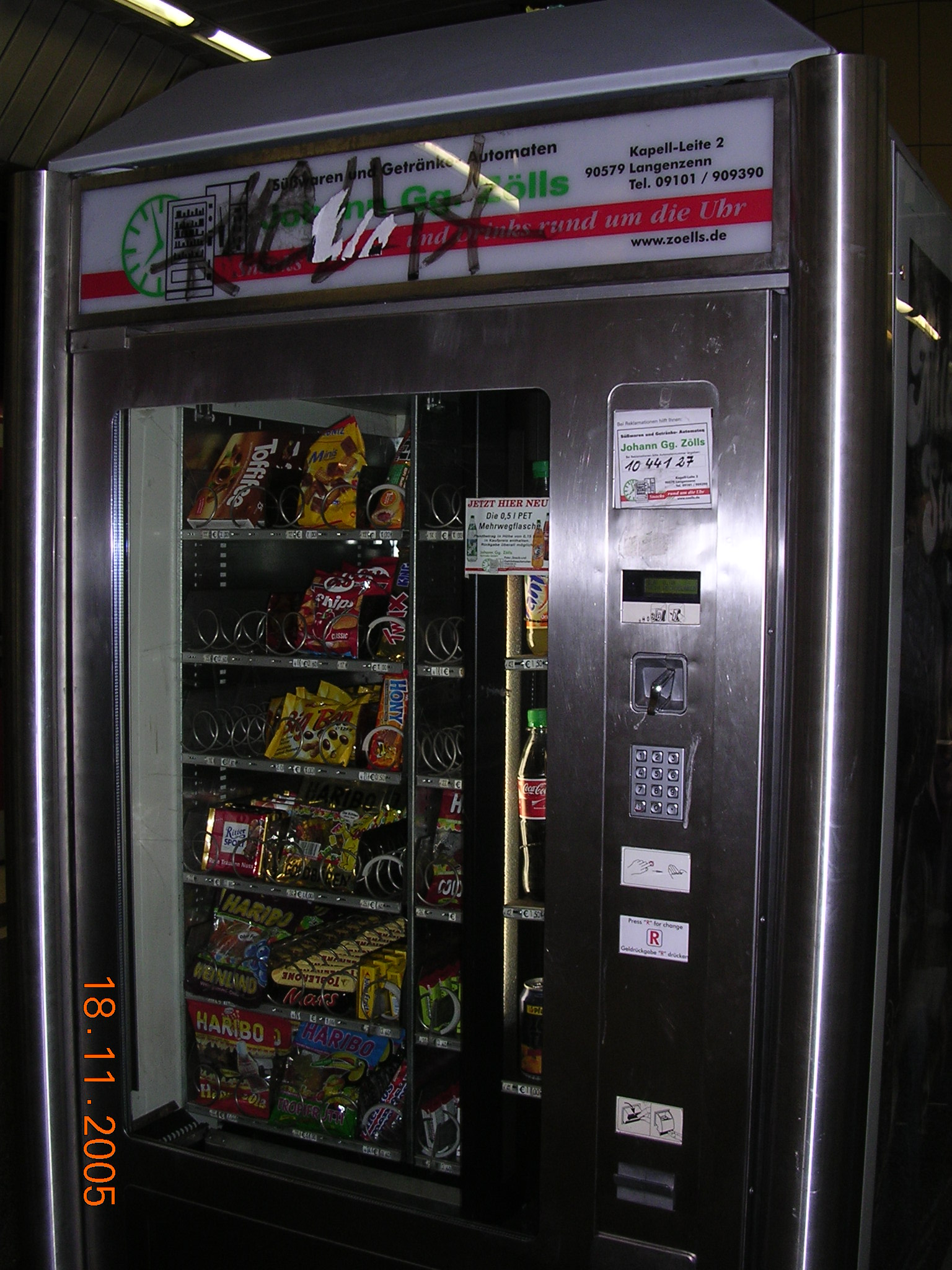 Food dealing automat in Munich(S-Bahn stop Rosenheimer Platz)